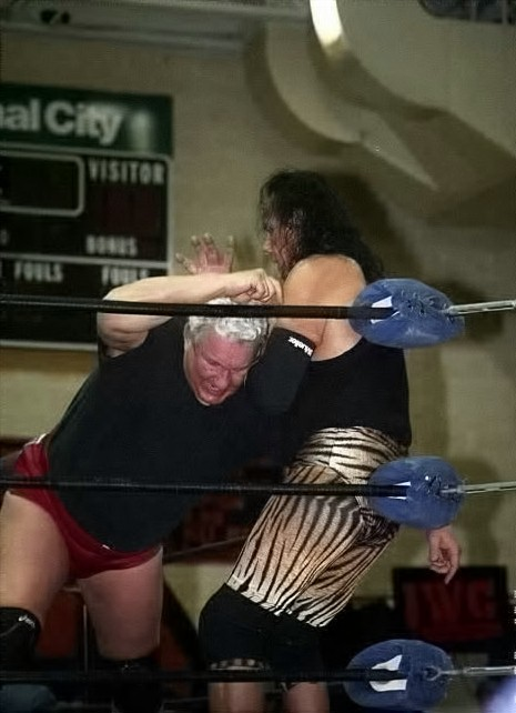 Wrestling legend Jimmy Snuka takes on Bob Orton Jr. on 3/28/09 from Franklin PA